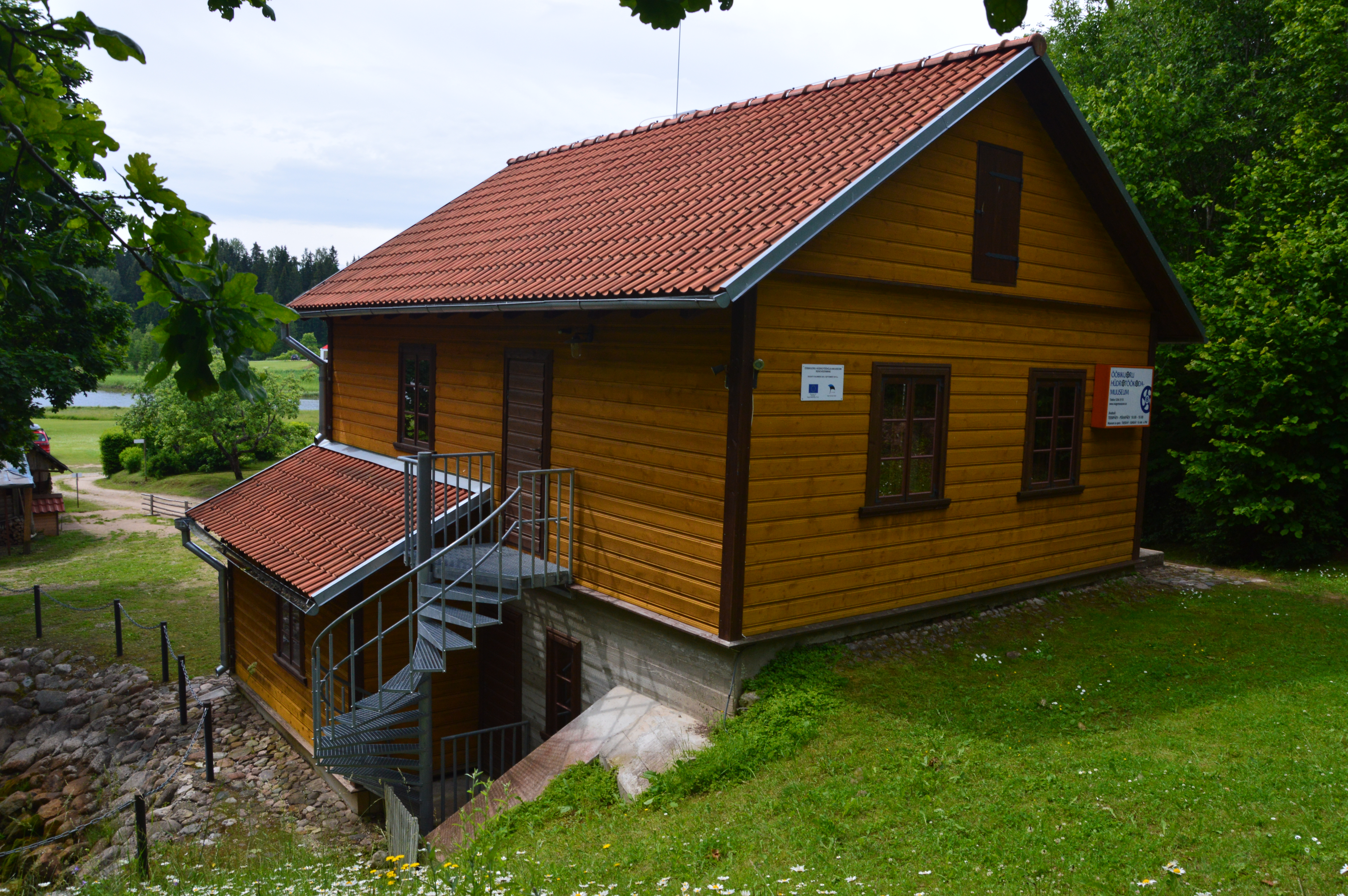 Ööbikuoru hüdrotöökoda-muuseum